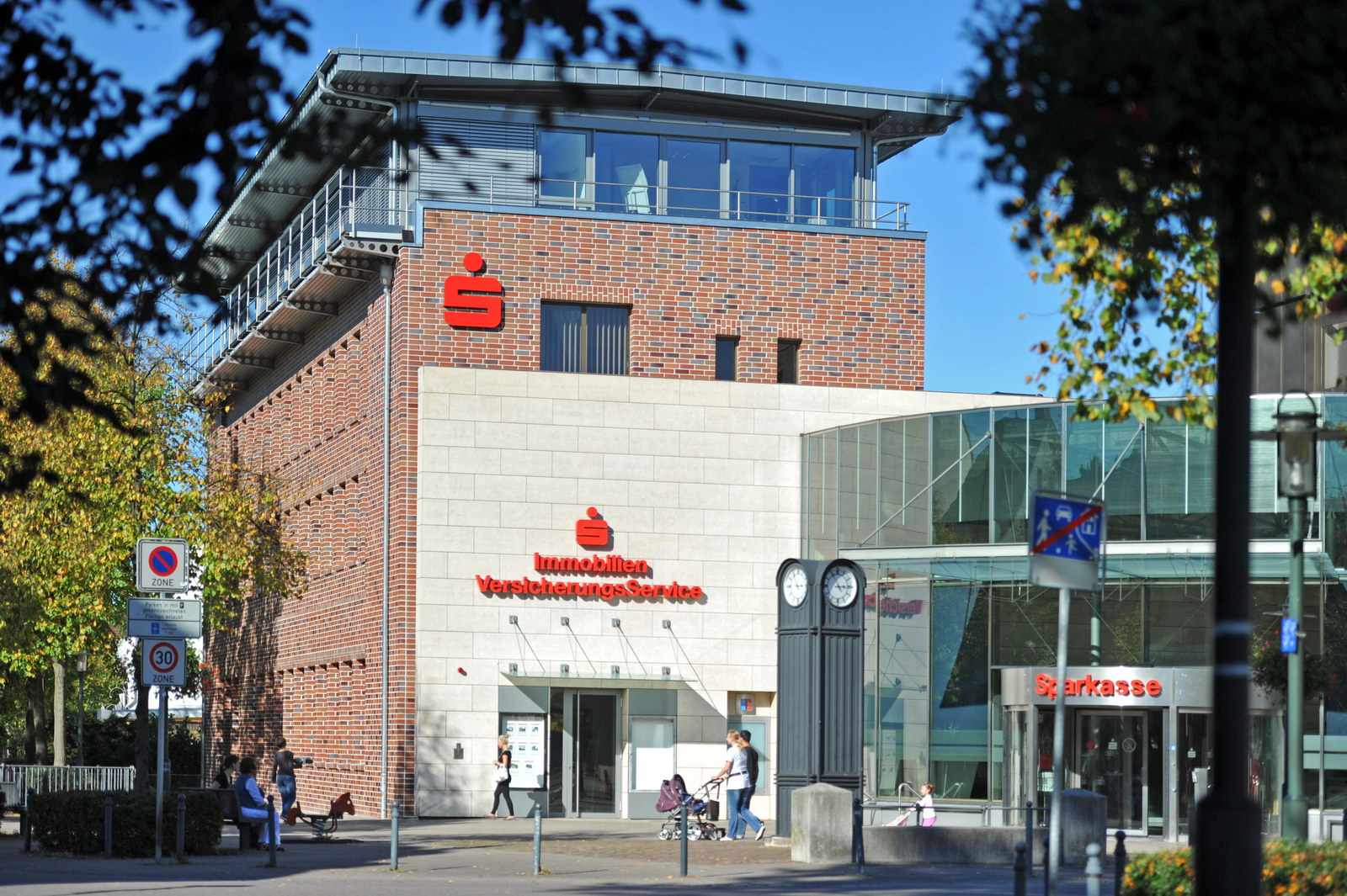 Neue Hauptstelle der Sparkasse Märkisches Sauerland Hemer–Menden mit Ausbau